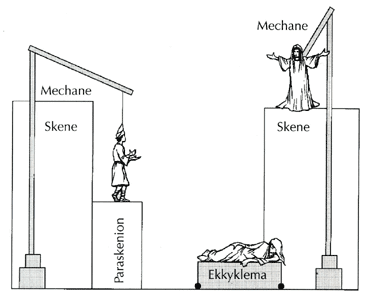 Pla visual del funcionament i la situació de l'Ekkyklema.